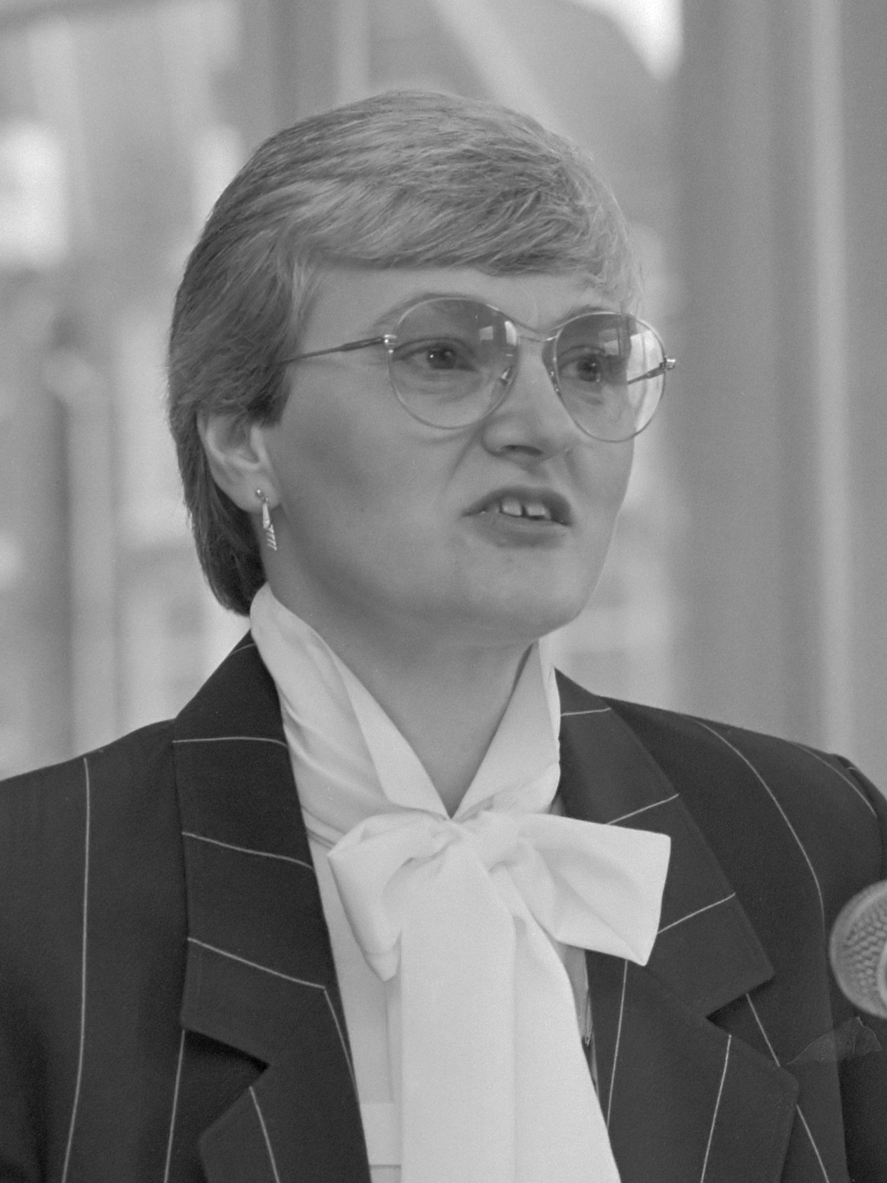 Persconferentie Nederlandse Opera in Amsterdam i.v.m. rapport organisatie bureau Thomas Harris en dir. Tuze Lodder (l) en voorzitter drs. B. Sartphati 10 maart 1988